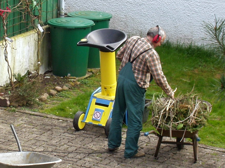 Bewohner aus dem Nordschwarzwald beim Häckseln